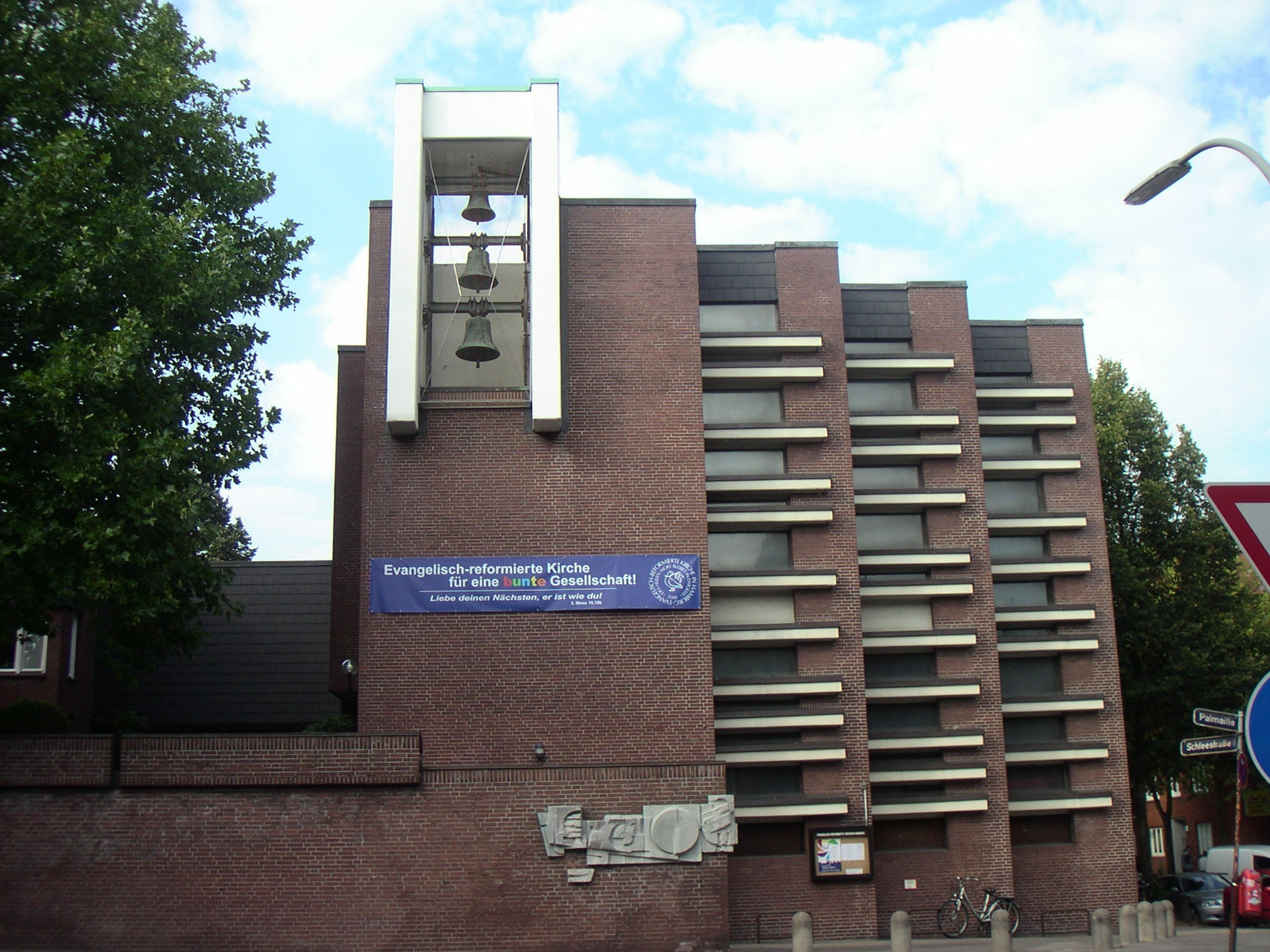 Hamburg, Altona-Altstadt, Palmaille, Evangelisch reformierte Kirche